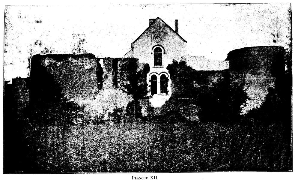 Le Donjon de Courmenant, ses origines, ses seigneurs et possesseurs, son musée